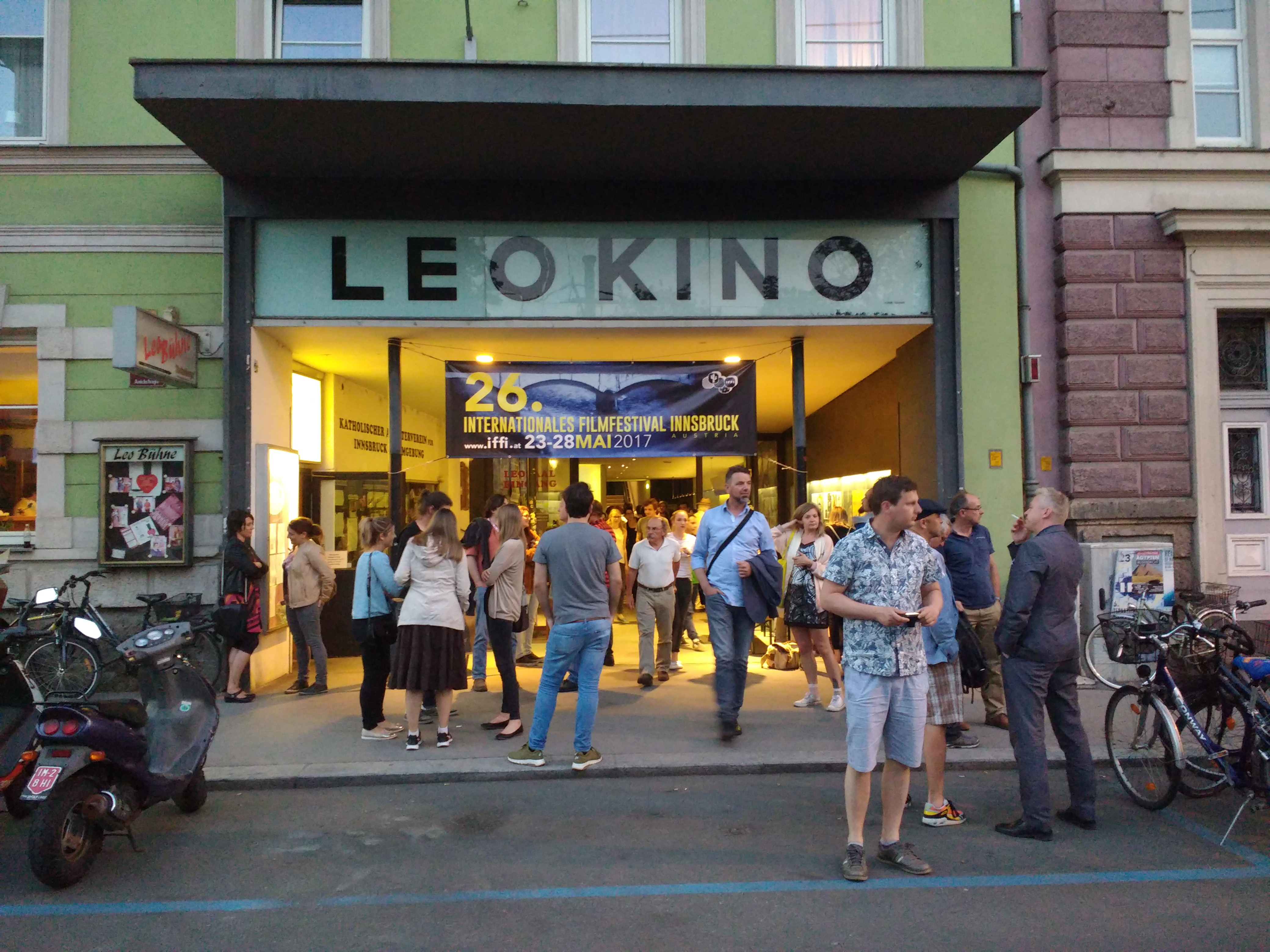 Eingang des Leokino während des IFFI 2017